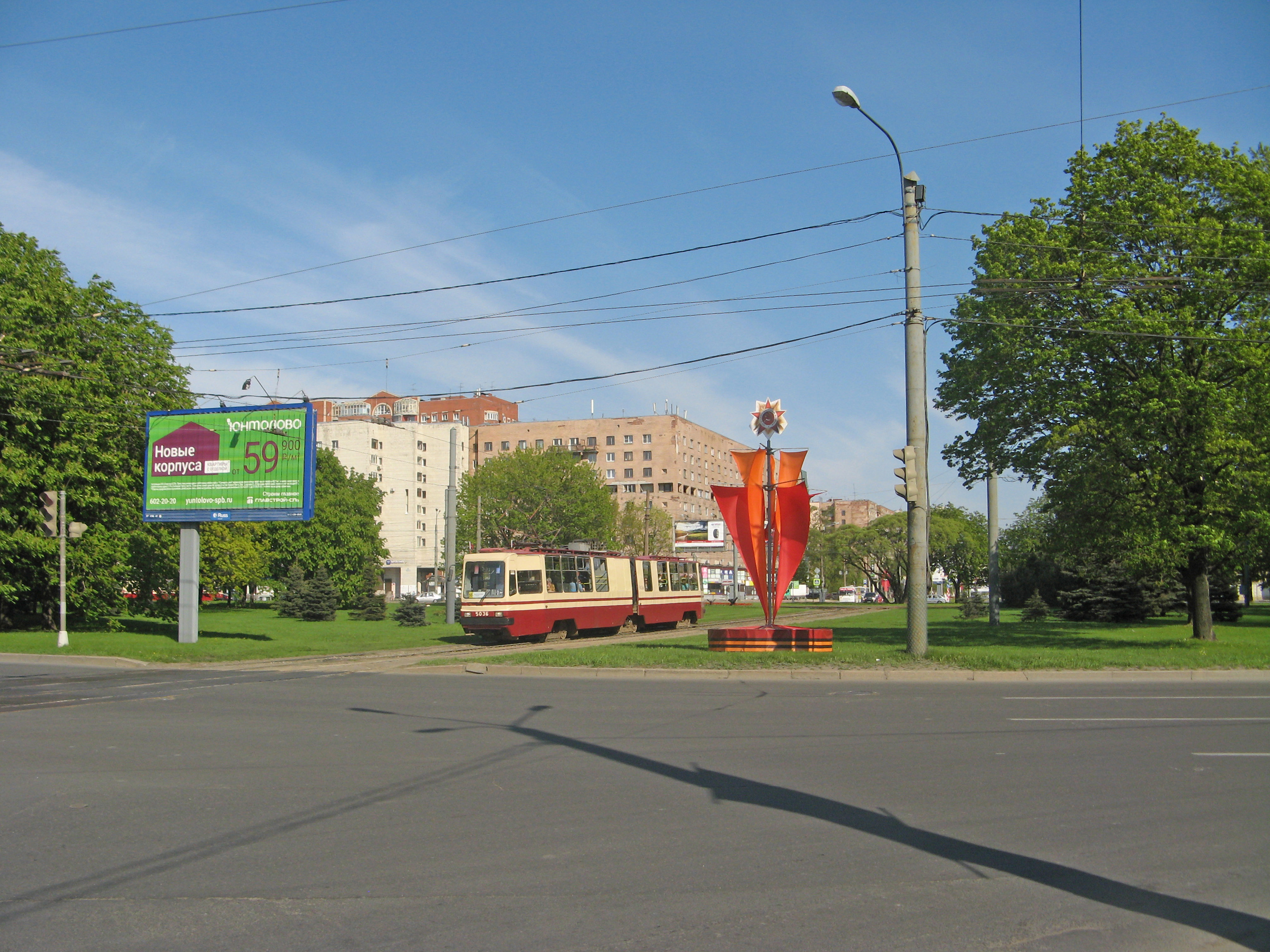 Санкт-Петербург, пл. Мужества